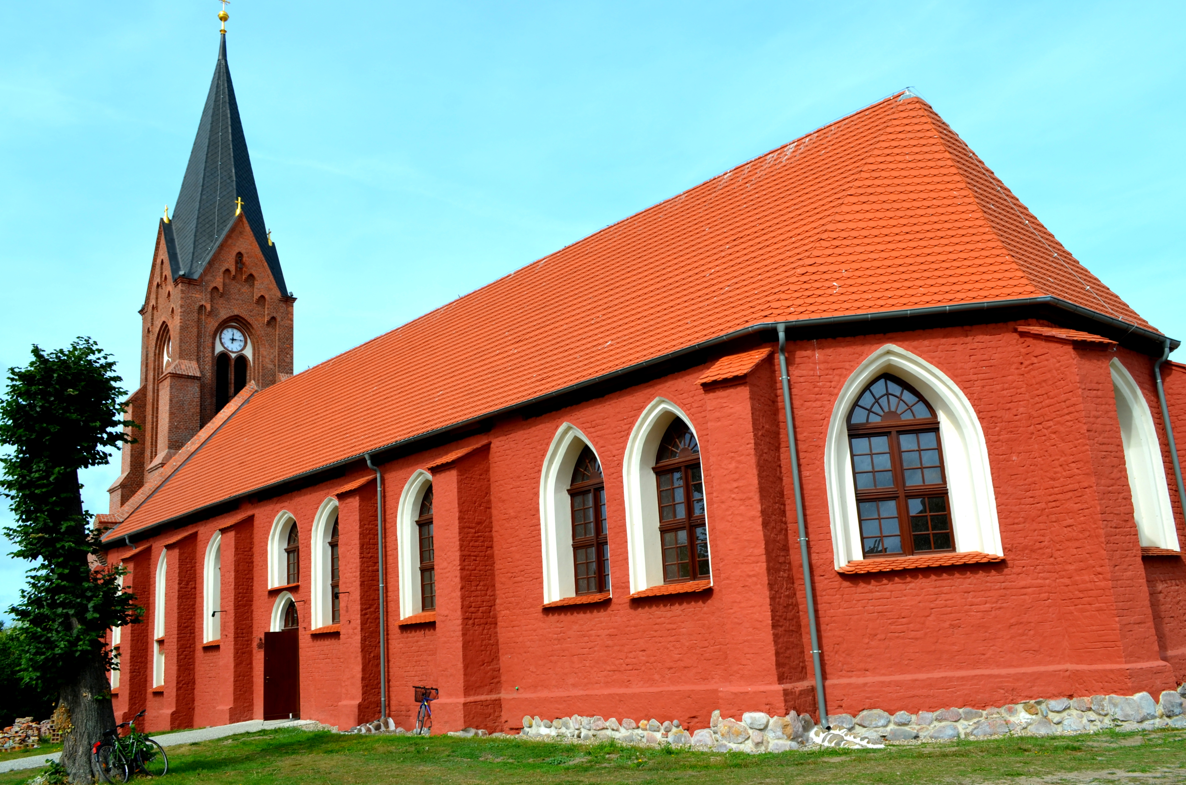 Nowe Warpno - kościół pararafialny p.w. Wniebowzięcia NMP